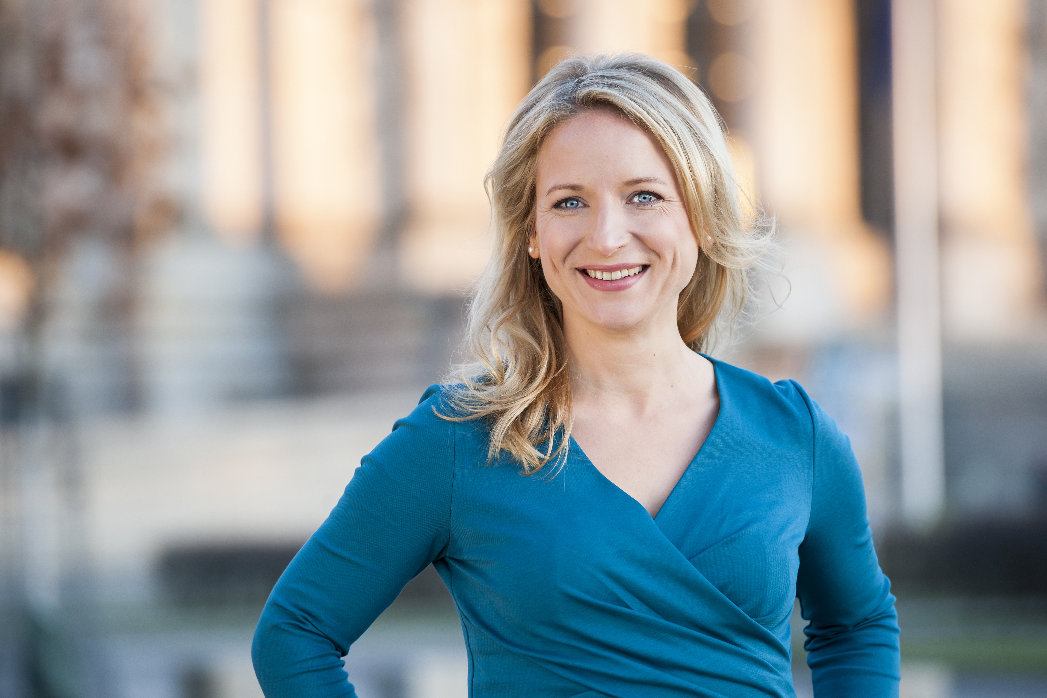 Daniela Kluckert vor dem Deutschen Bundestag